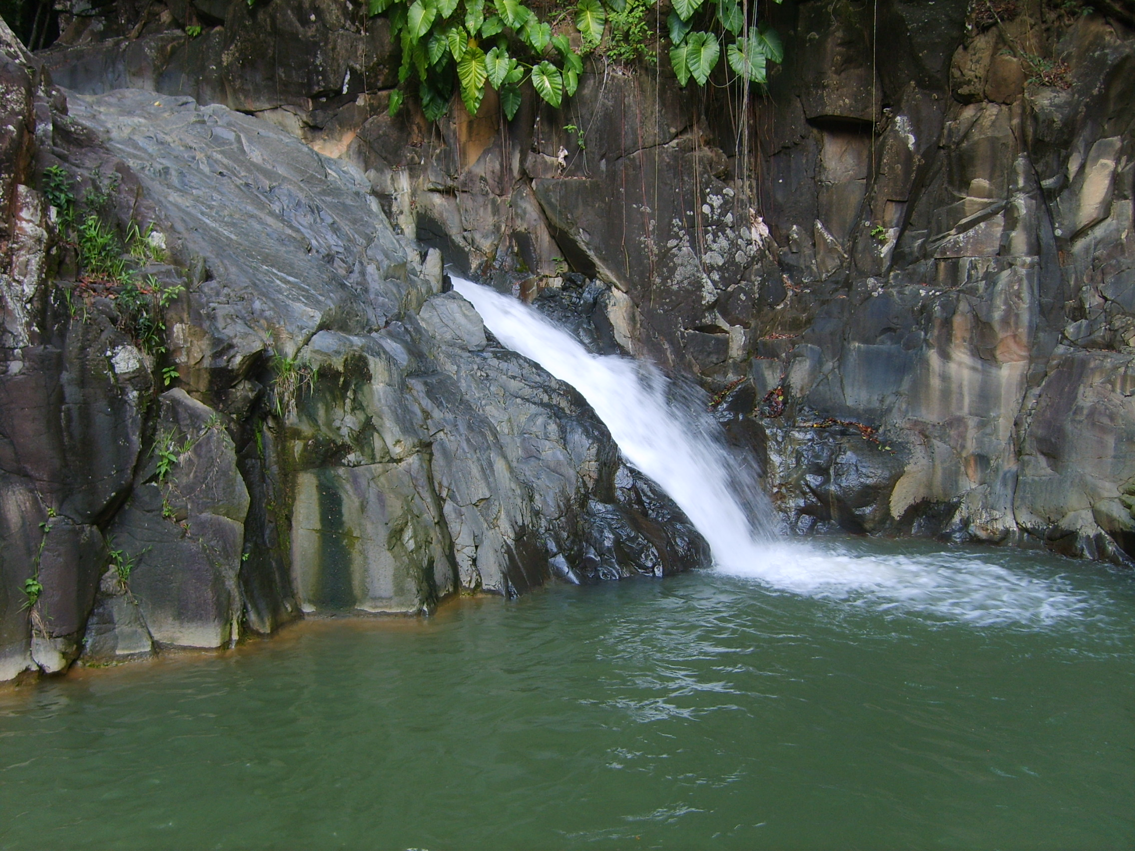 Cascade Acomat (Guadeloupe) près de Mahaut. France